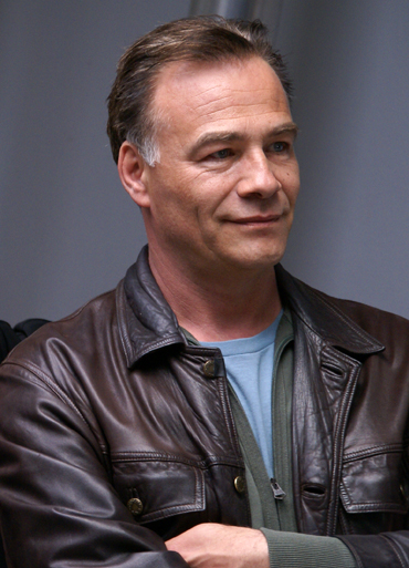 Schauspieler Klaus J. Behrendt